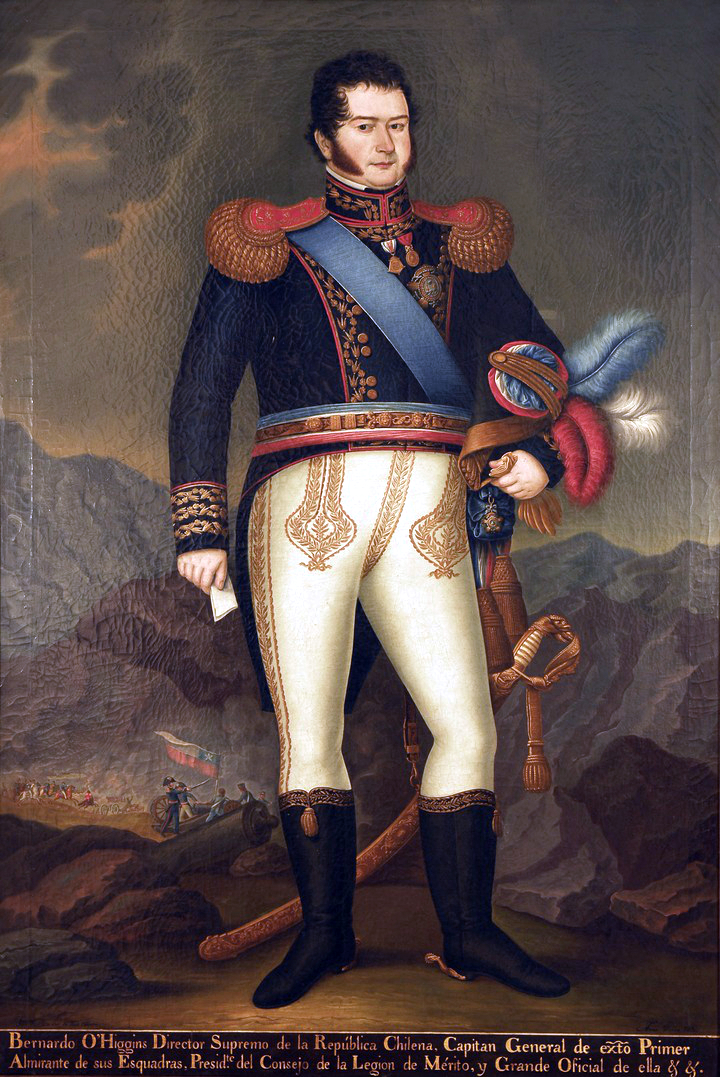 Retrato de Don Bernardo O'Higgins. Oleo sobre tela del pintor limeño José Gil de Castro(1785-1850) Colección: Museo Histórico Nacional de Chile.